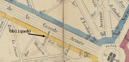 extrait plan général des travaux de la ville de paris de 1866 avec la rue Obligado rebaptisée rue d'Argentine en 1948